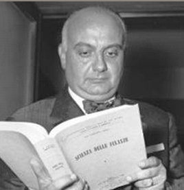 Glauco Della Porta